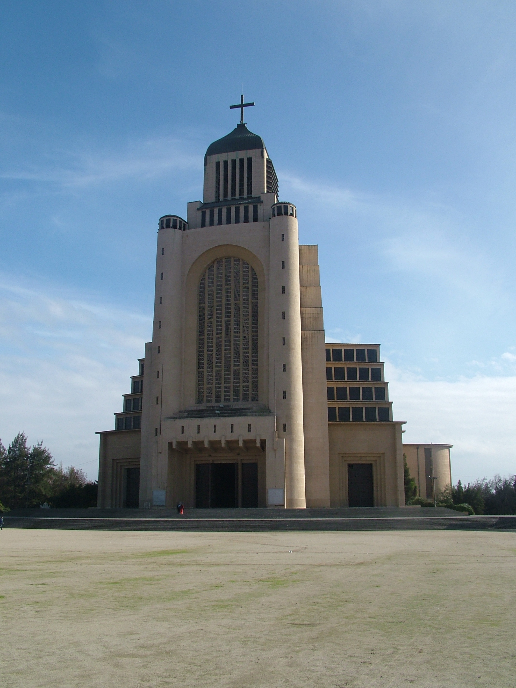 Templo católico en honor a Virgen del Carmen, en comuna de Maipú, región Metropolitana, Chile